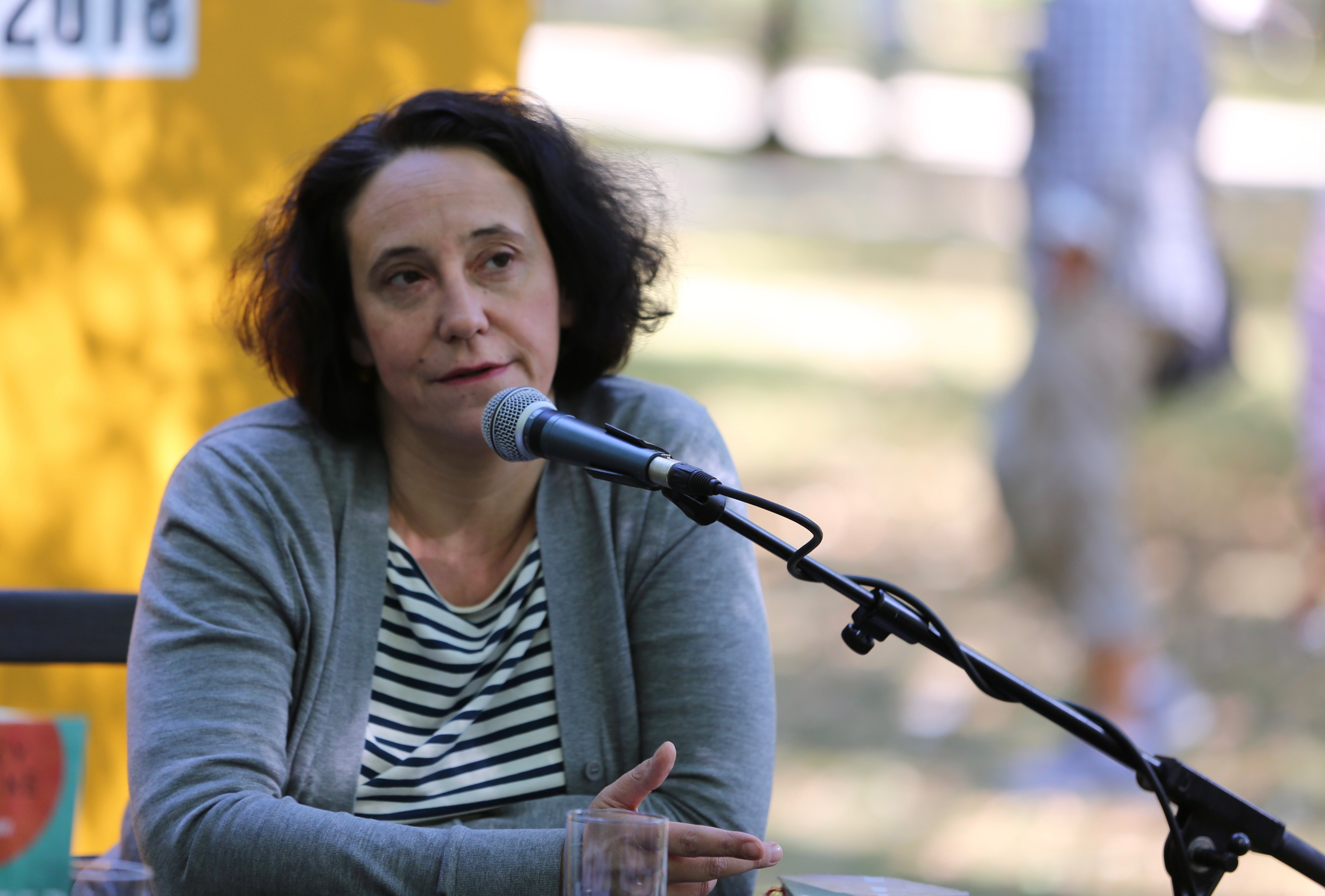 Lucy Fricke beim Erlanger Poetenfest 2018